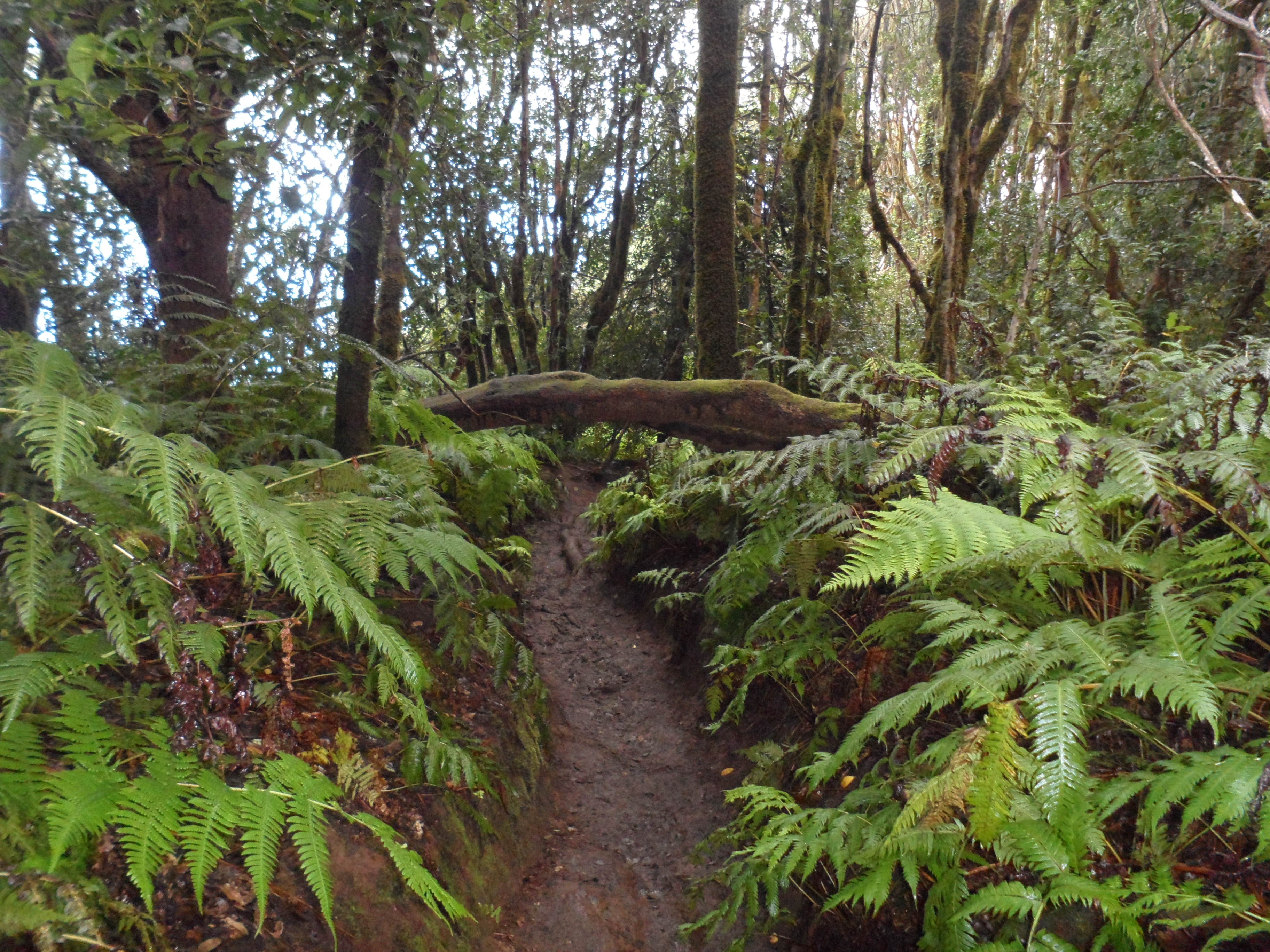 Sendero La Ensillada- Mirador Cabezo del Tejo (Reserva natural integral del Pijaral)